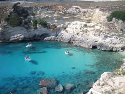 La bellissima baia di Porto Miggiano